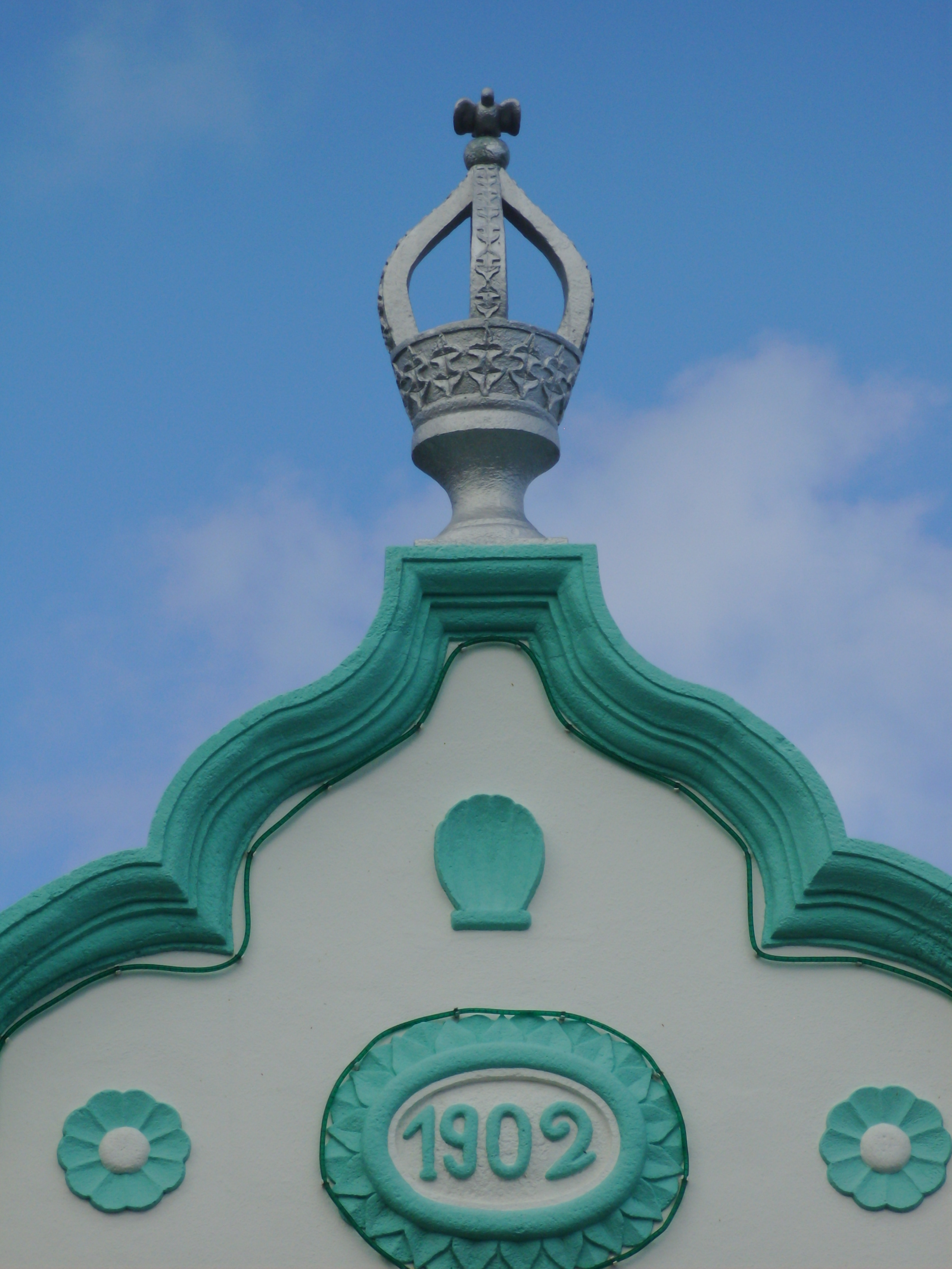 Império do Divino Espírito Santo no largo Comendador Pamplona, Cabo da Praia, Praia da Vitória, Ilha Terceira, Açores: data.